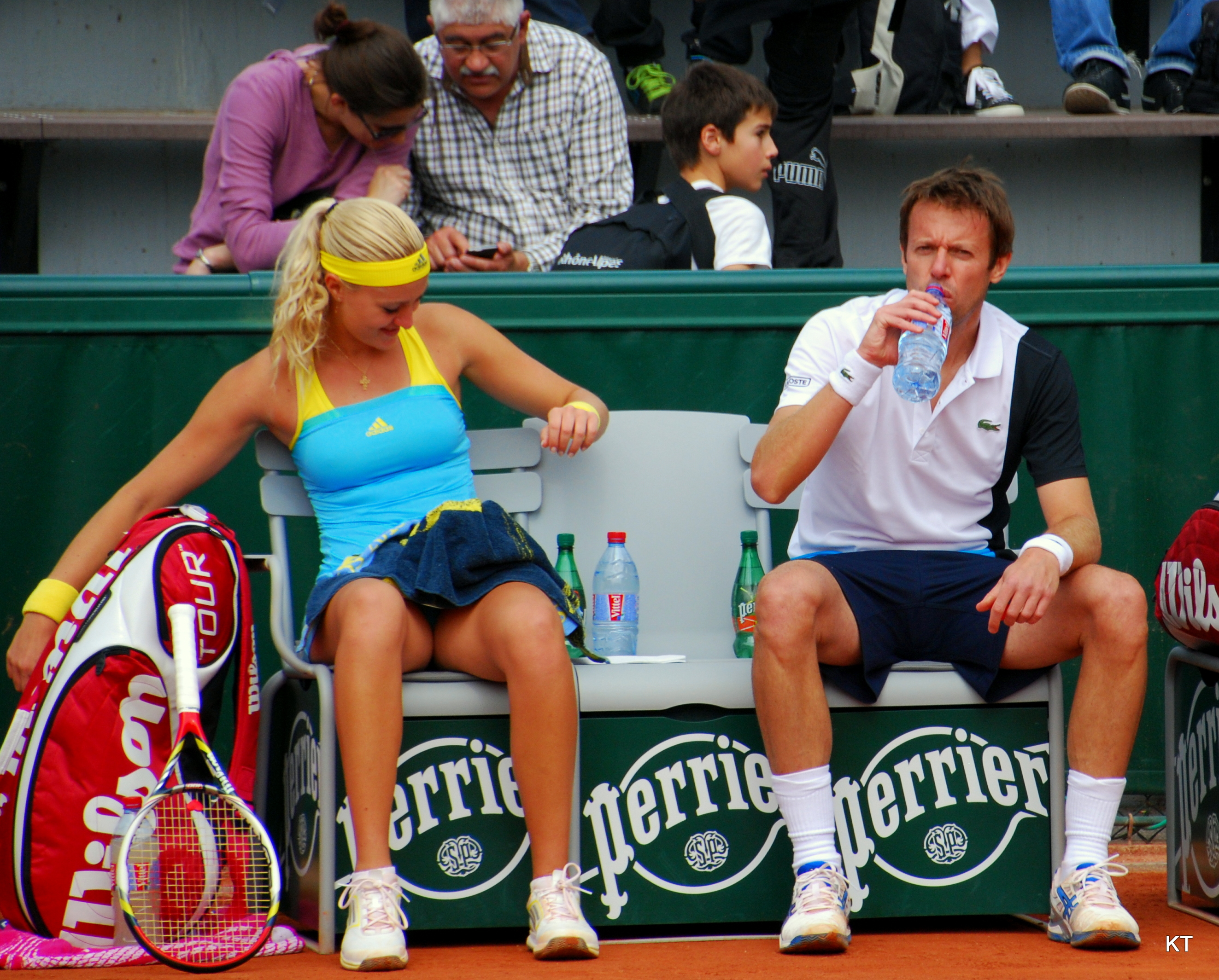 Kristina Mladenovic & Daniel Nestor